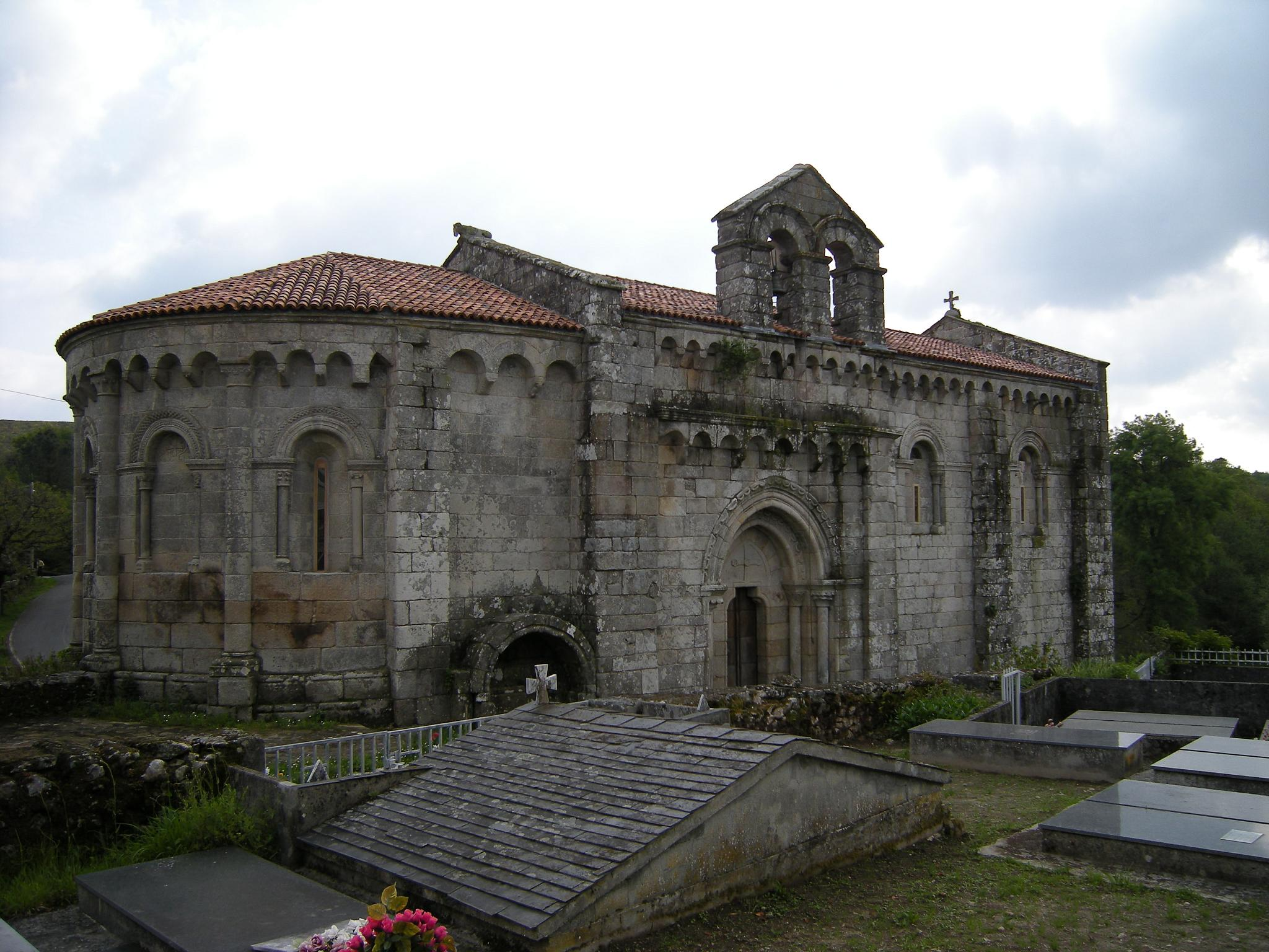 es: Mantiene integra su primitiva fábrica, y una característica poco común es la situación de la espadaña en la mitad de su muro norte.